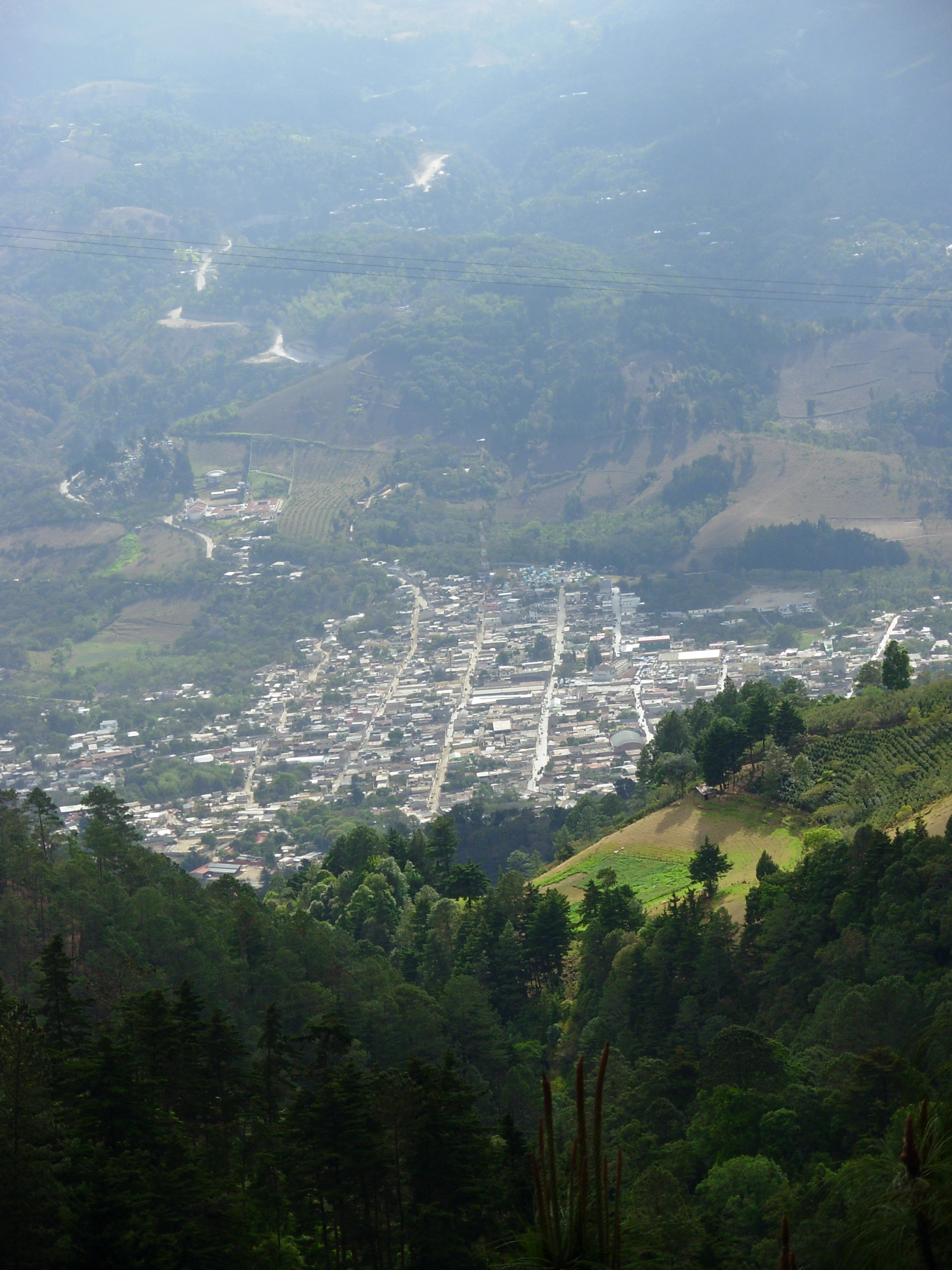 Bajando de Miramundo y Pino Dulce se ve la ciudad de Mataquescuintla.